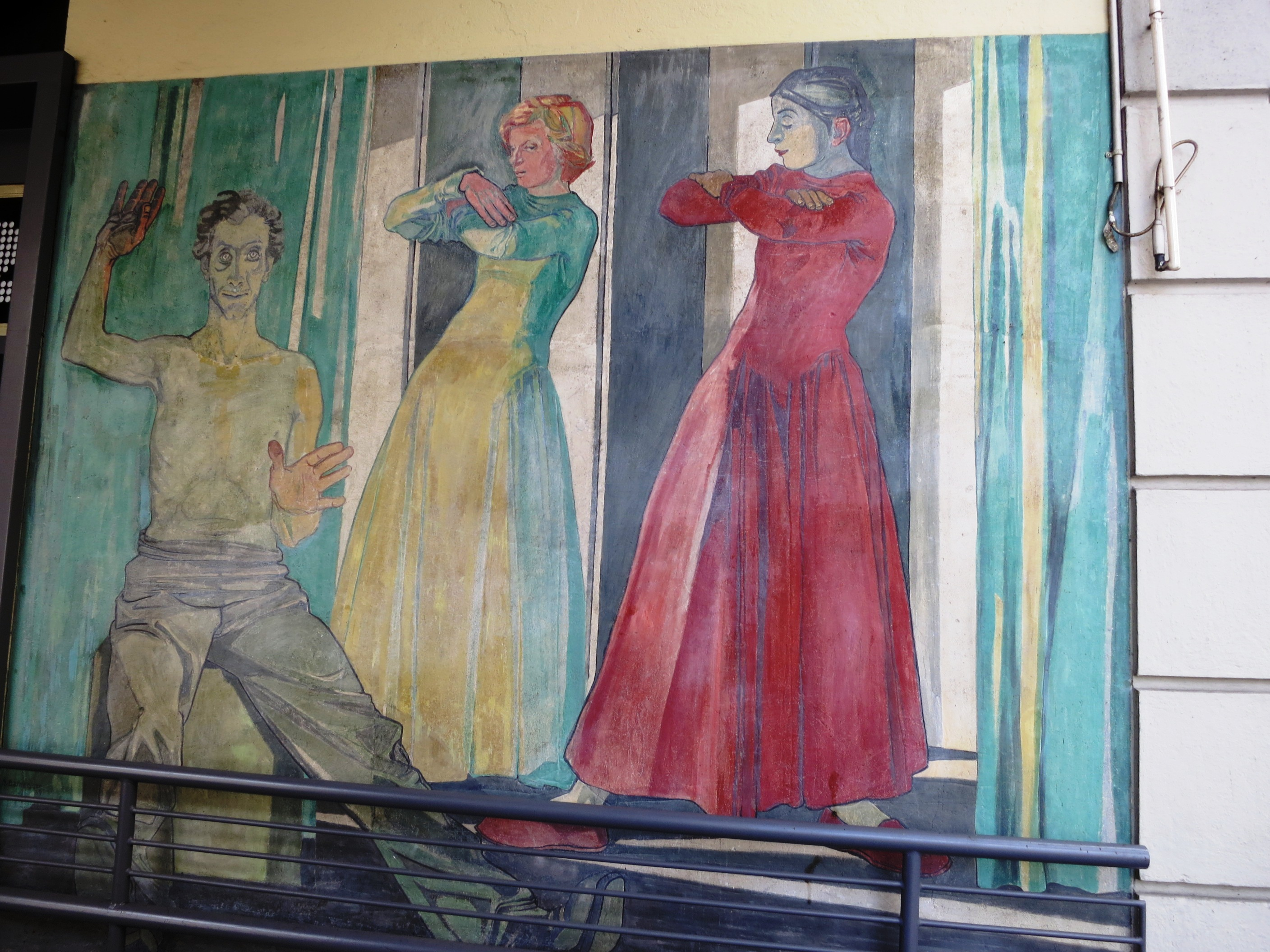 Alfred Bernegger, Kino Piccadilly, Zürich, Schweiz